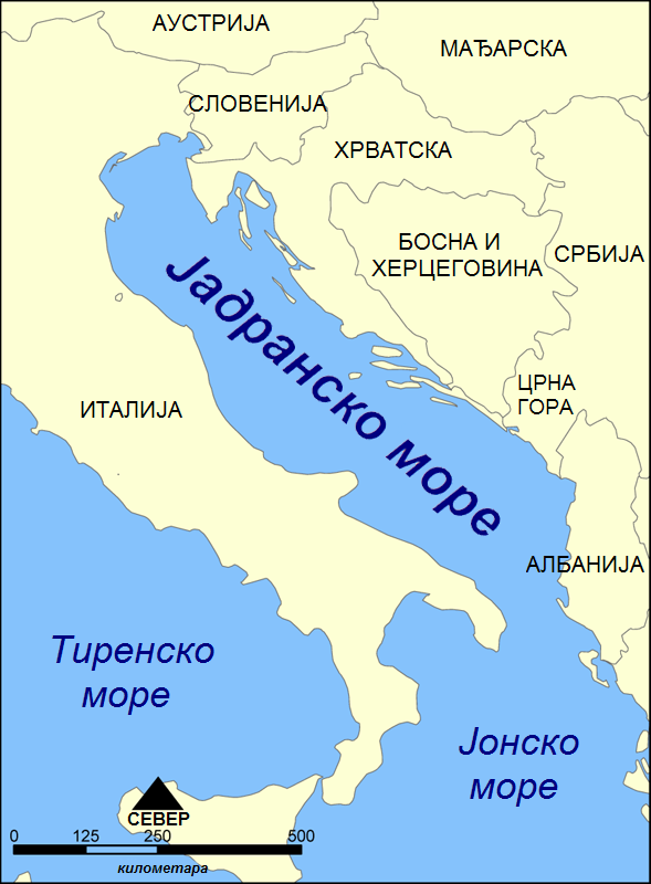 Мапа Јадранског мора; Превод оригиналне верзије слике :en:File:Adriatic Sea map.png